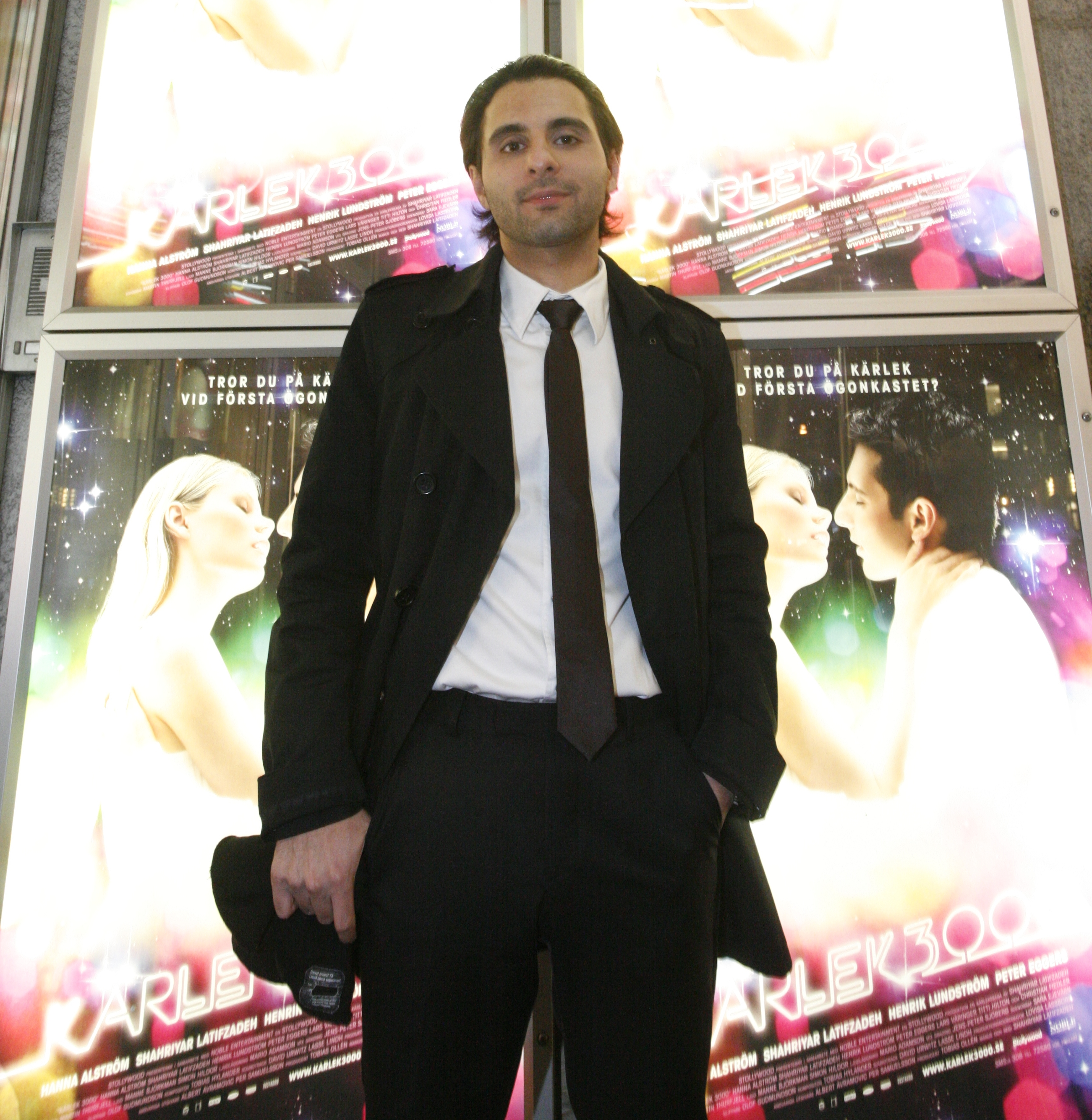 Regissören Shahriyar Latifzadeh utanför biografen Saga i Stockholm, i samband med galapremiären av sin debutfilm Kärlek 3000.